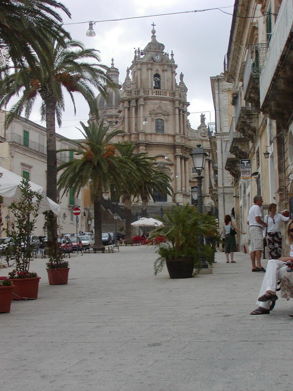 Ragusa Sicilia Italia.